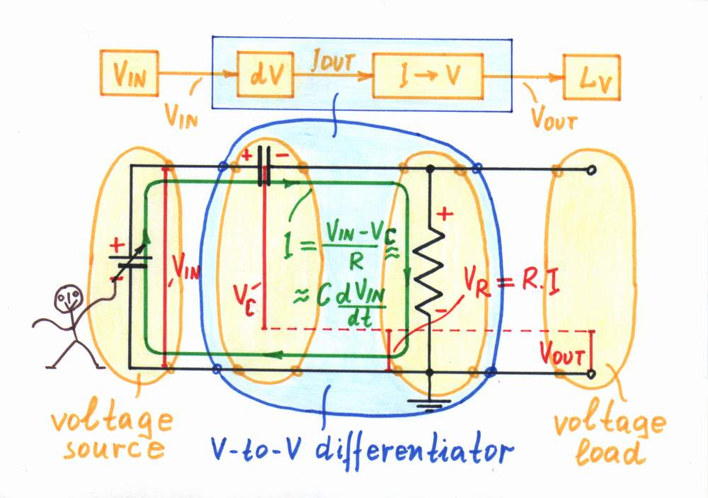 CR passive differentiator